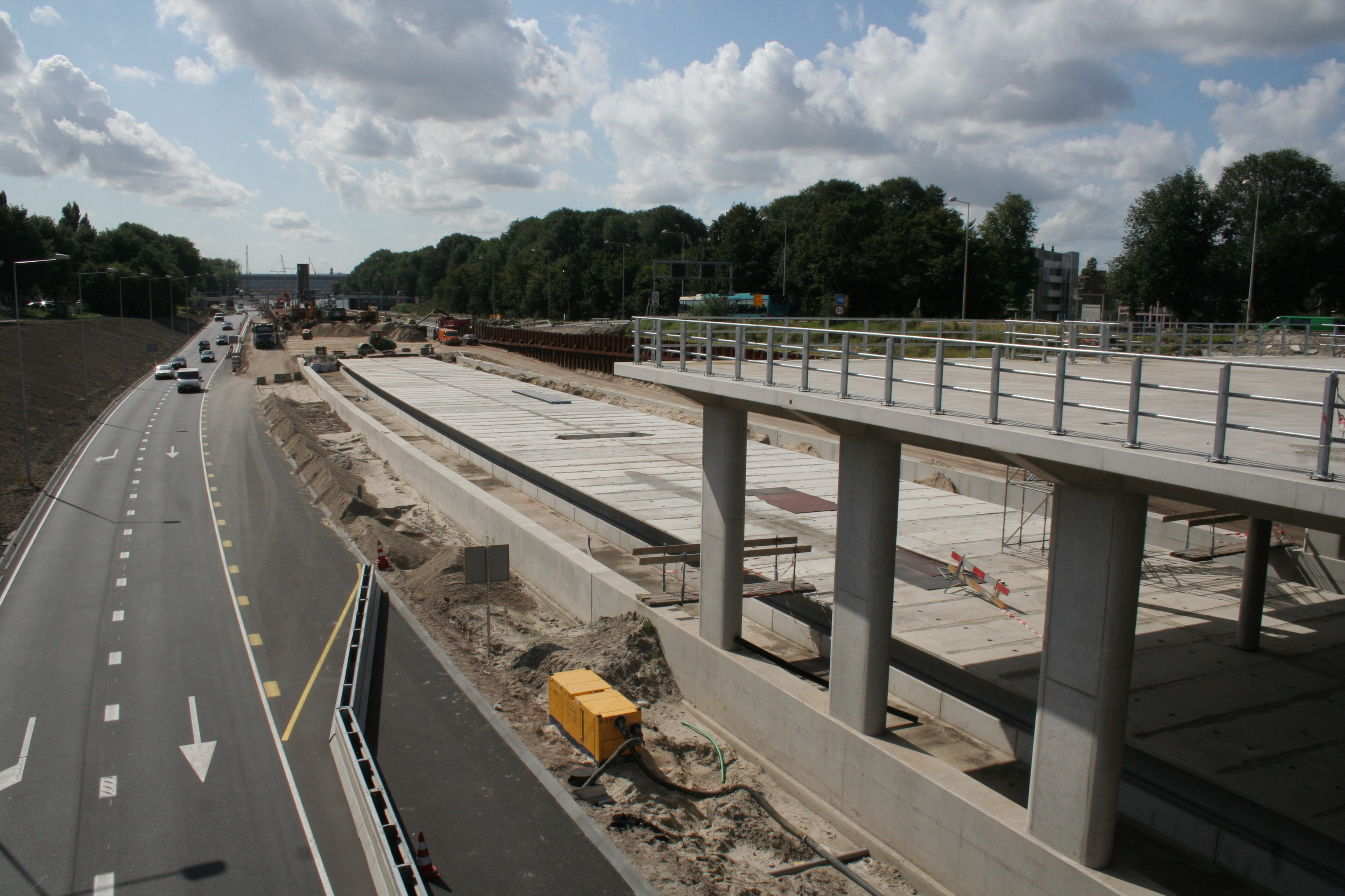 Metrostation Johan van Hasseltweg in september 2008. Inmiddels is het station in ruwbouw gereed.